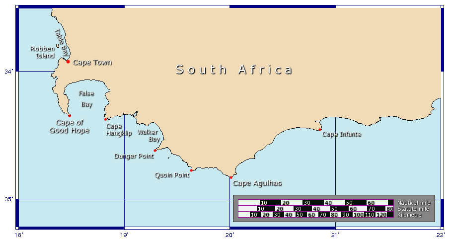 Mapa de localización de la región. A map showing the Cape of Good Hope and Cape Agulhas. Generated using GMT.